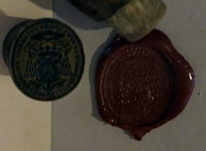 présenté lors de l'exposition.